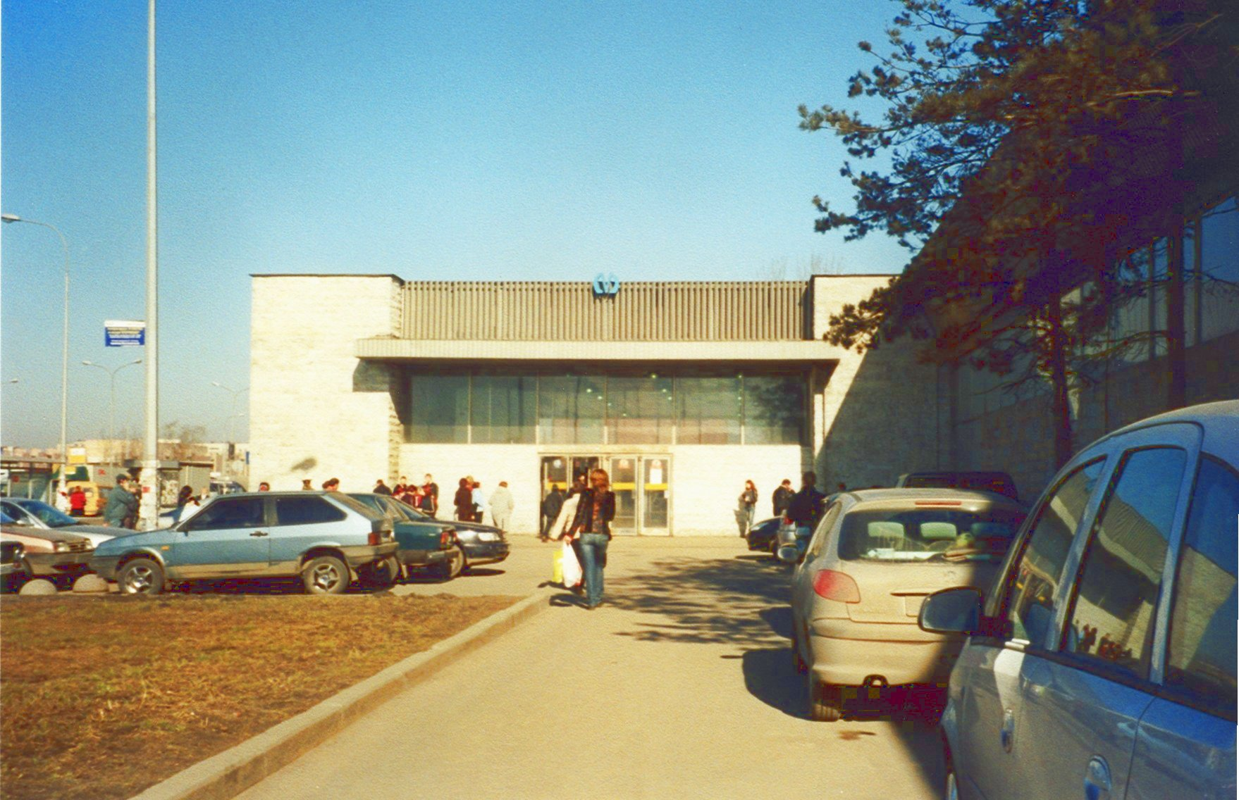 Наземный зал станции метро «Купчино»